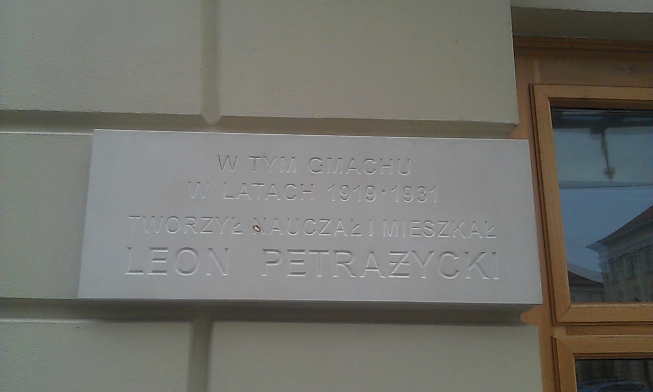 Tablica "W tym gmachu w latach 1919-1931 tworzył, nauczał i mieszkał Leon Petrażycki" przy wejściu do Collegium Iuridicum I.